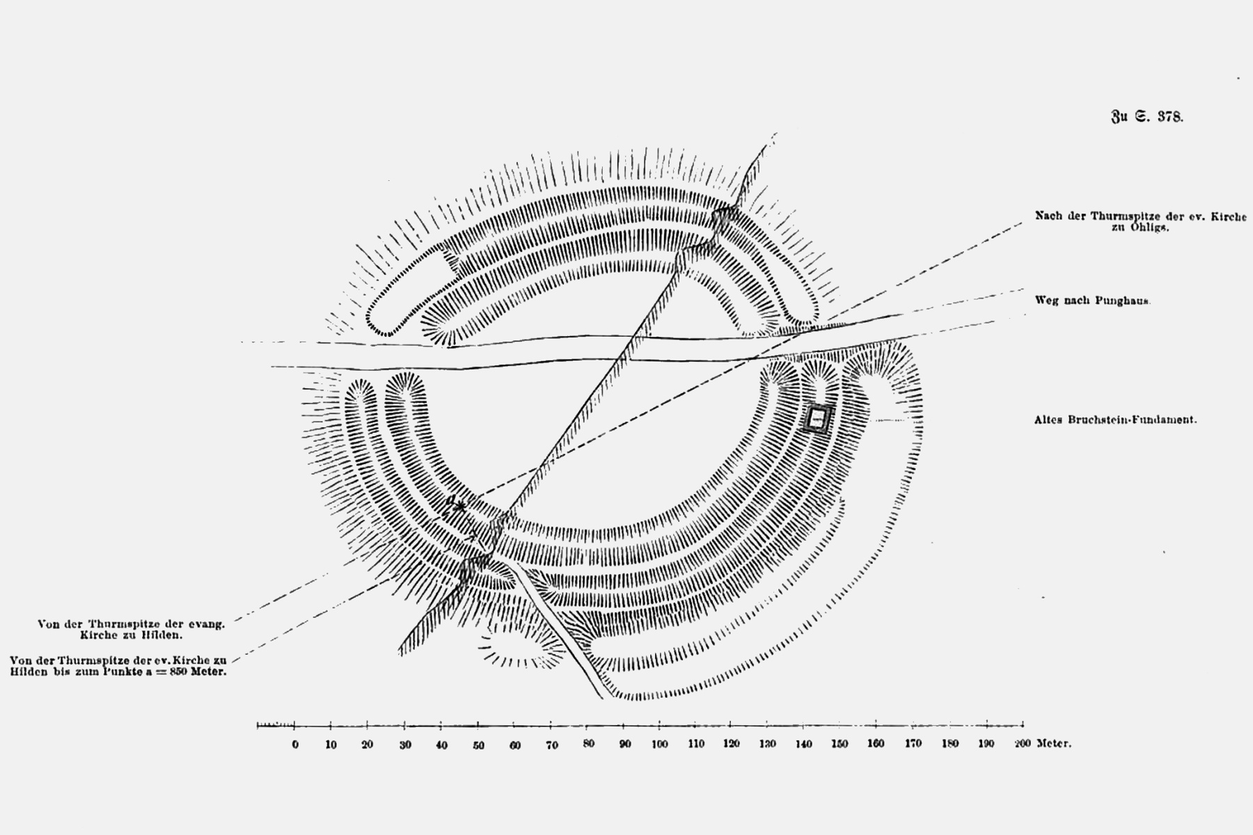 Abbildung "Heidenburg bei Hilden", jetzt Holterhöfchen (Hilden, Kreis Mettmann) genannt. Anmerkung: Zur Einnordung ist die Skizze um 35 Grad im Uhrzeigersinn zu drehen.